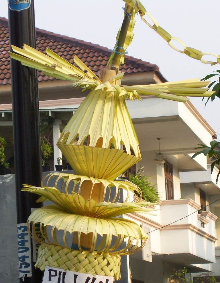 Detail janur kuning